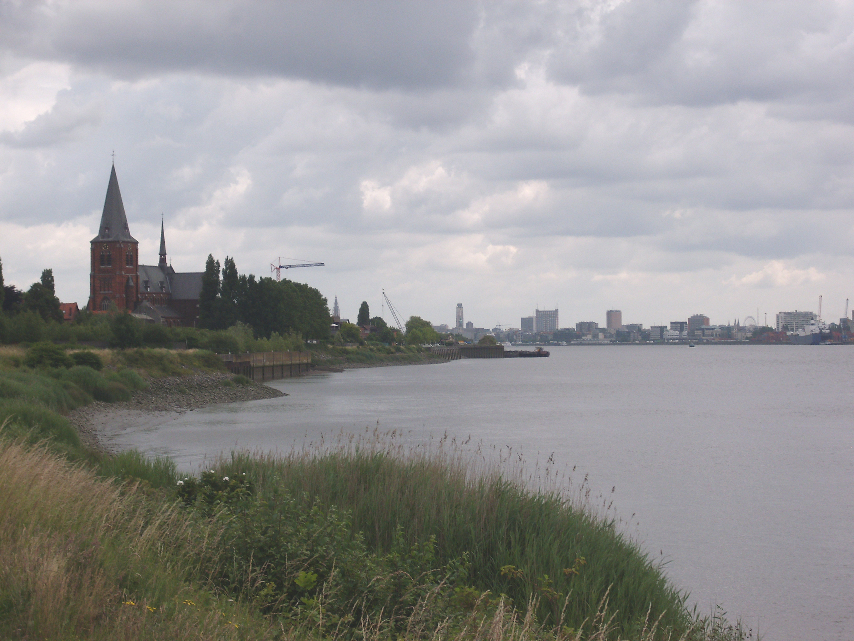 Zicht op Burcht aan de Schelde - op de achtergrond de stad Antwerpen - provincie Antwerpen - Vlaanderen - België De Sint-Martinuskerk in Burcht werd op het einde van de 19de eeuw volledig afgebroken, op het gotische koor na. Op dezelfde plaats herrees een neogotische kerk (1889-1904). De kerk werd in 1940 zwaar beschadigd door een brandbom en werd na de oorlog volledig hersteld.